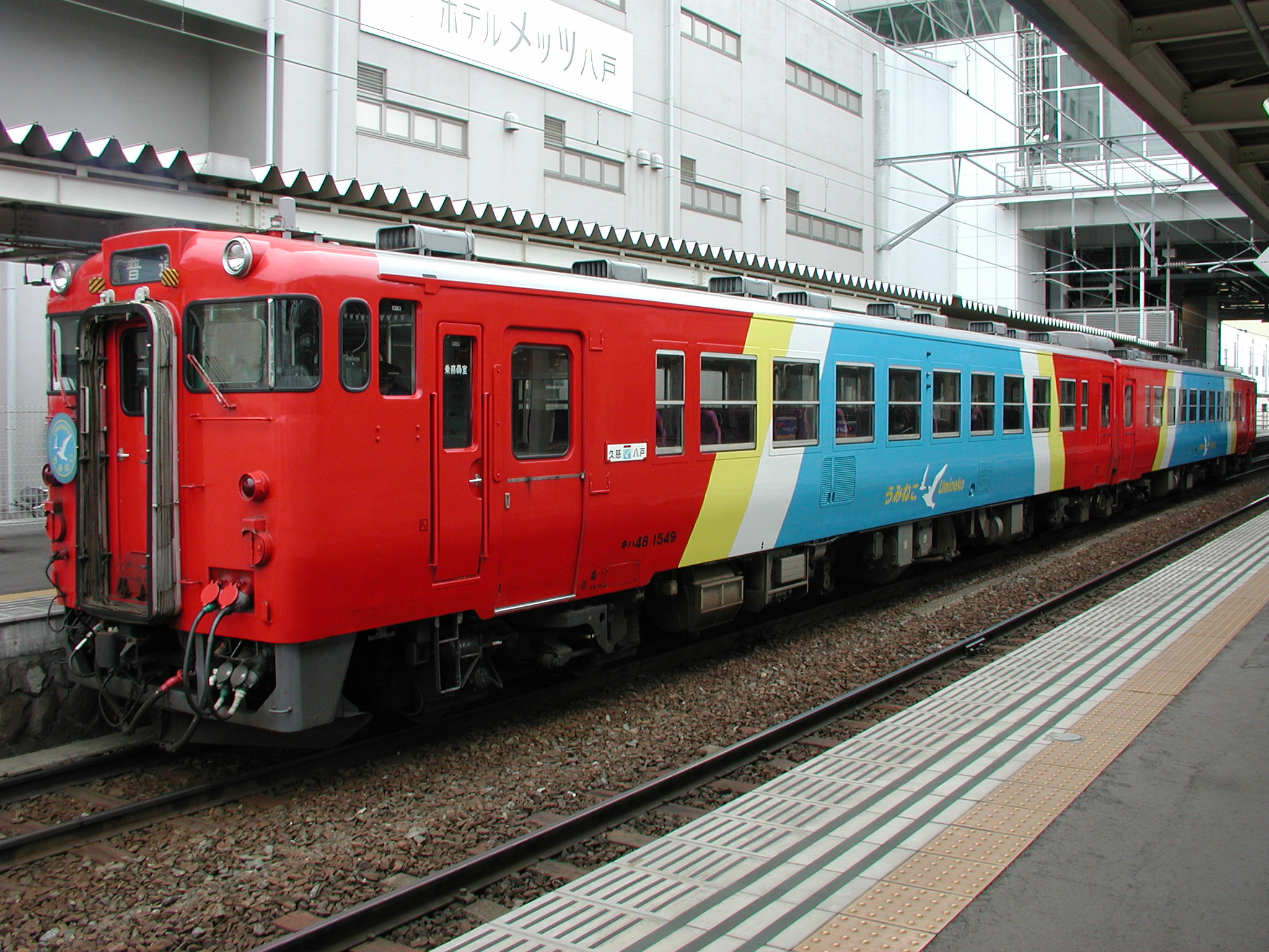 国鉄キハ48形気動車 ジョイフルトレイン『うみねこ』八戸駅にて